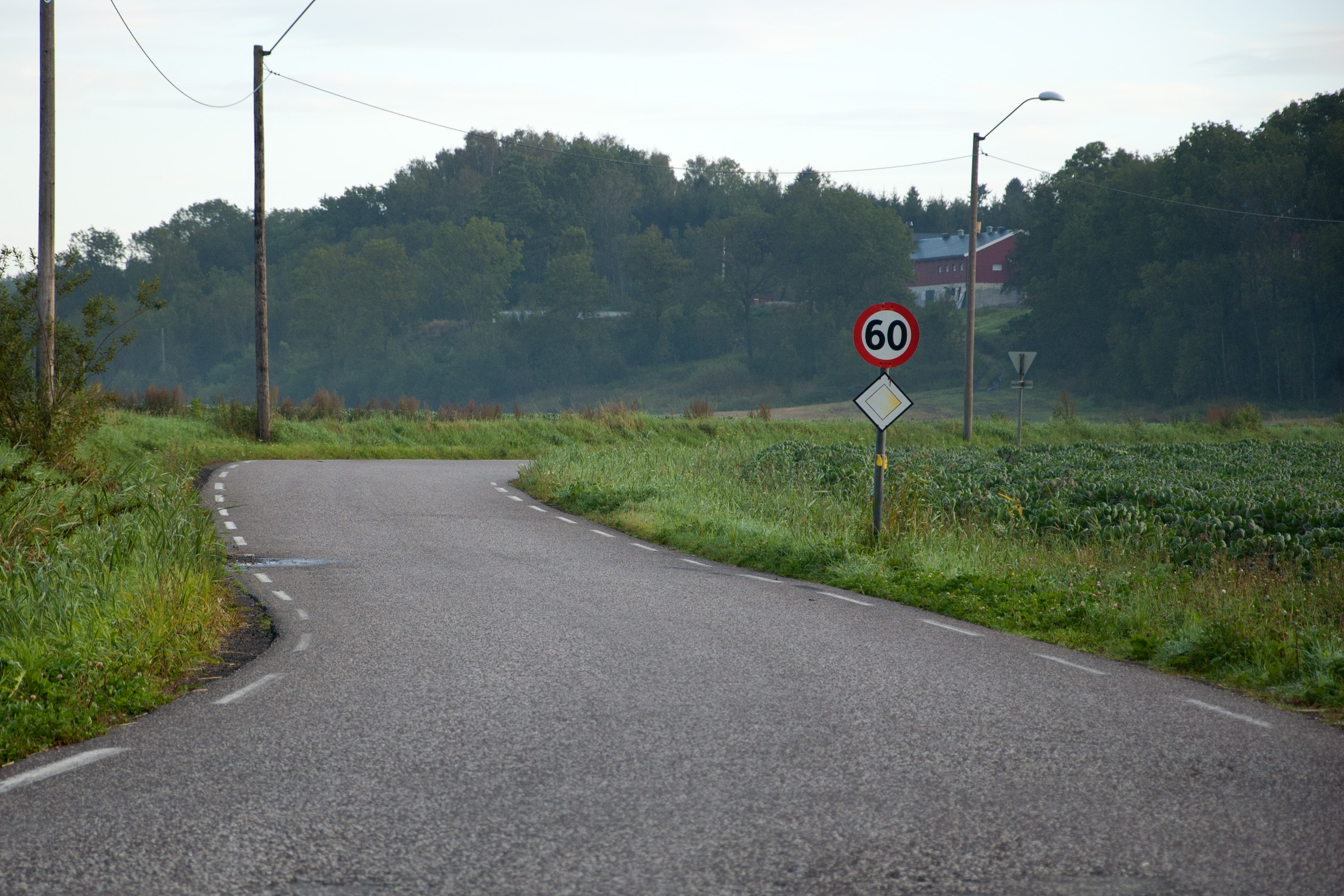 Fylkesvei 460 Romsveien i Tønsberg, Vestfold